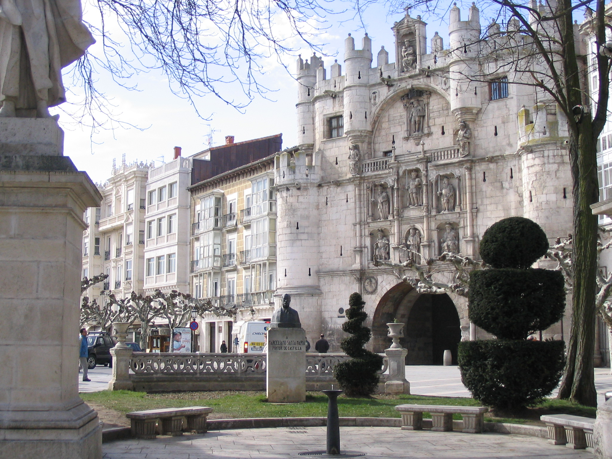 Arco de Santa María View of Santa Maria Gate from Burgos. Picture taken by Daniel Cantón on 3-5-2004.